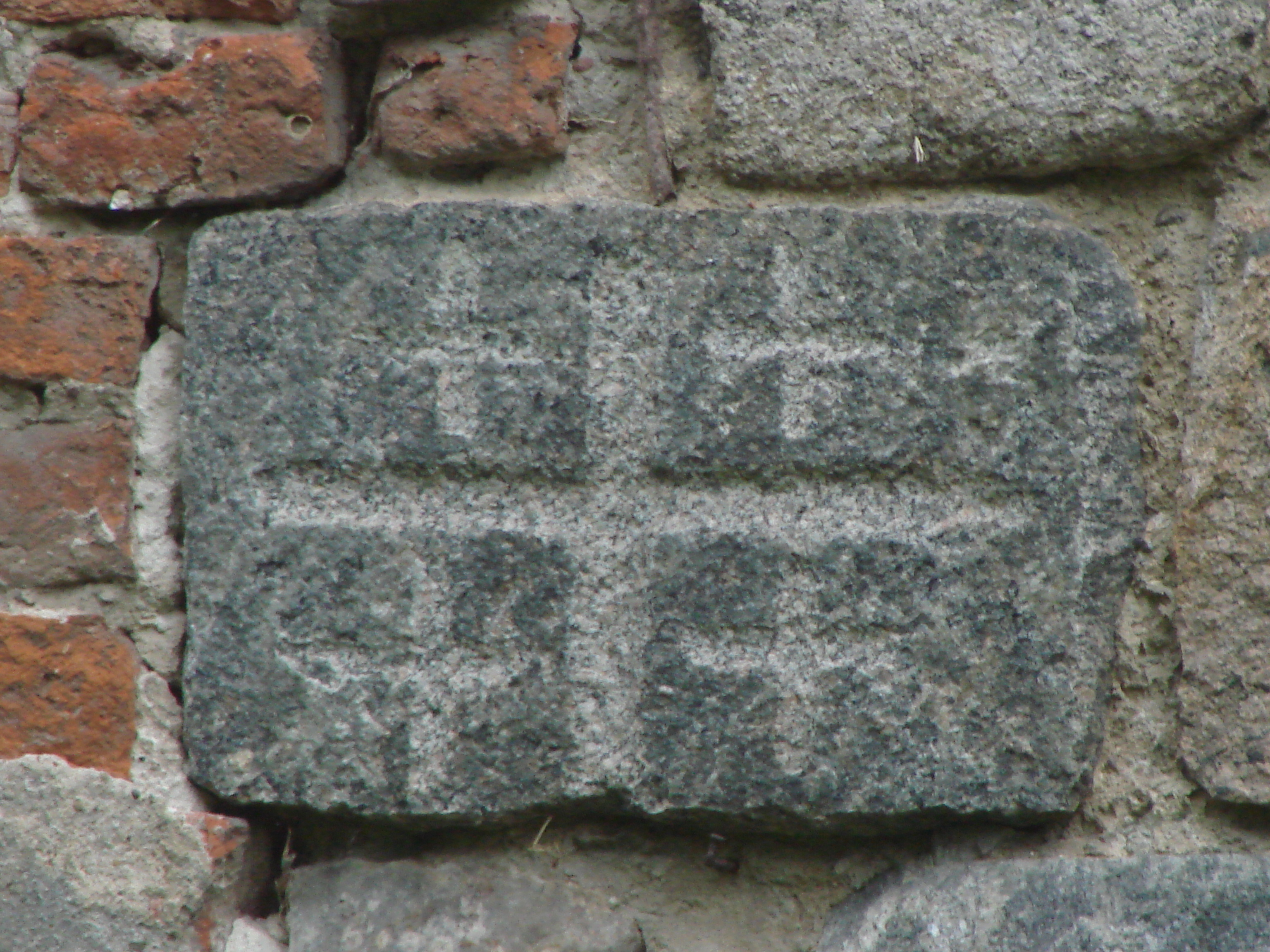 Kirche der Templer in Tempelberg